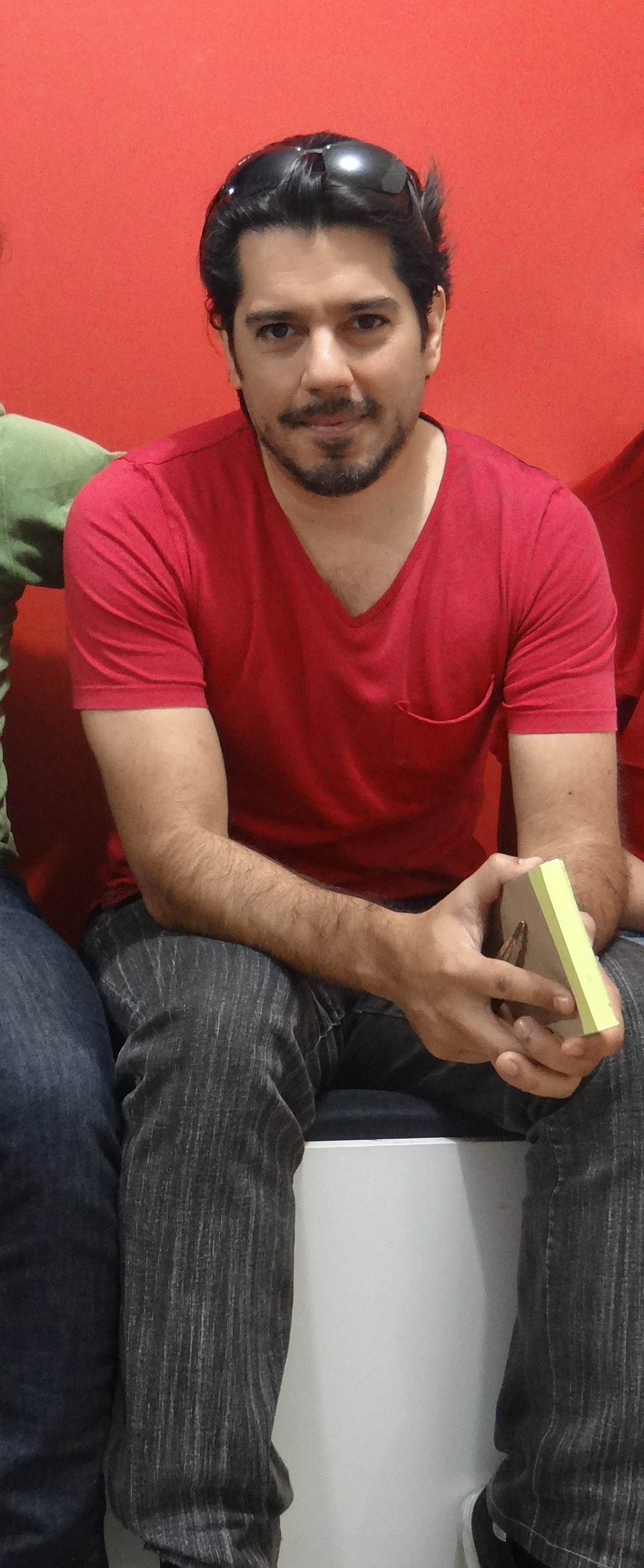 Andrés Pelaccini en septiembre de 2014